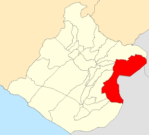 Mapa distrito Palca, Tacna - Perú